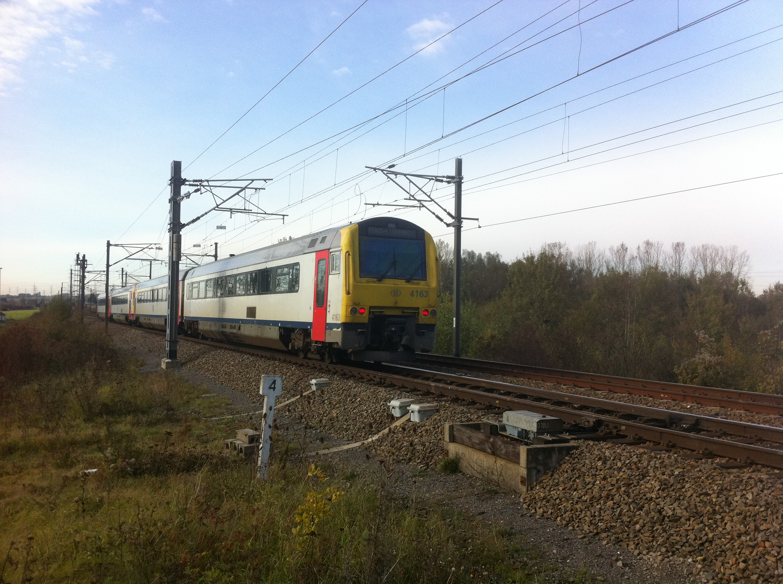 D'SNCB-Linn 165 tëscht Attem an Éibeng.